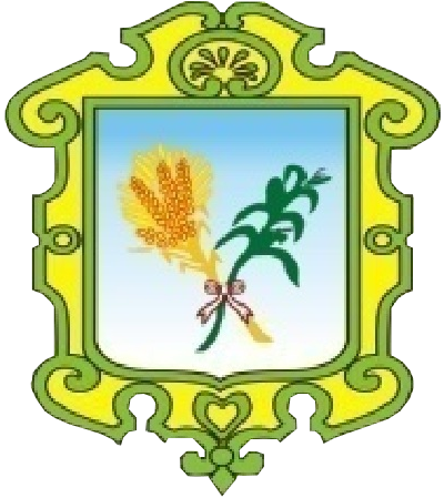 El escudo de Huamanguilla